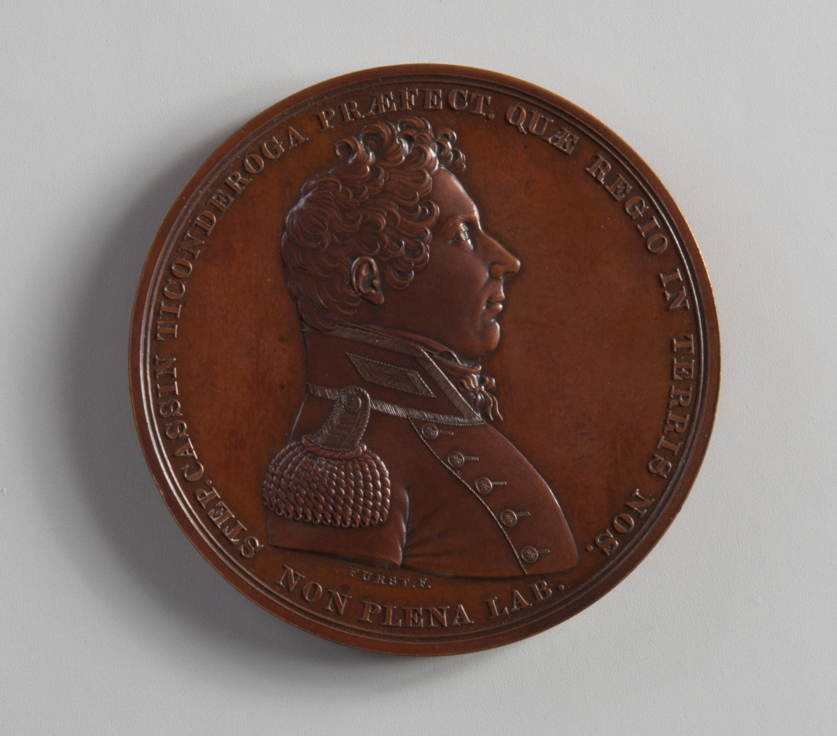 American; Medal; Metal